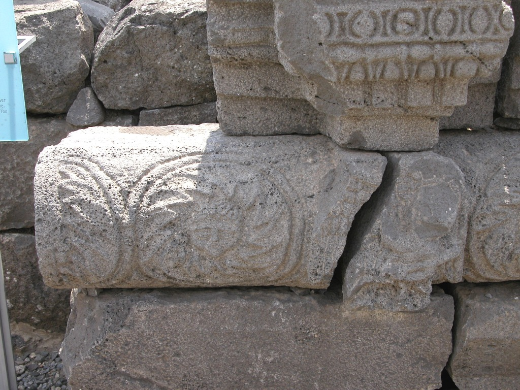 Old Synagogue in Korazim Israel.